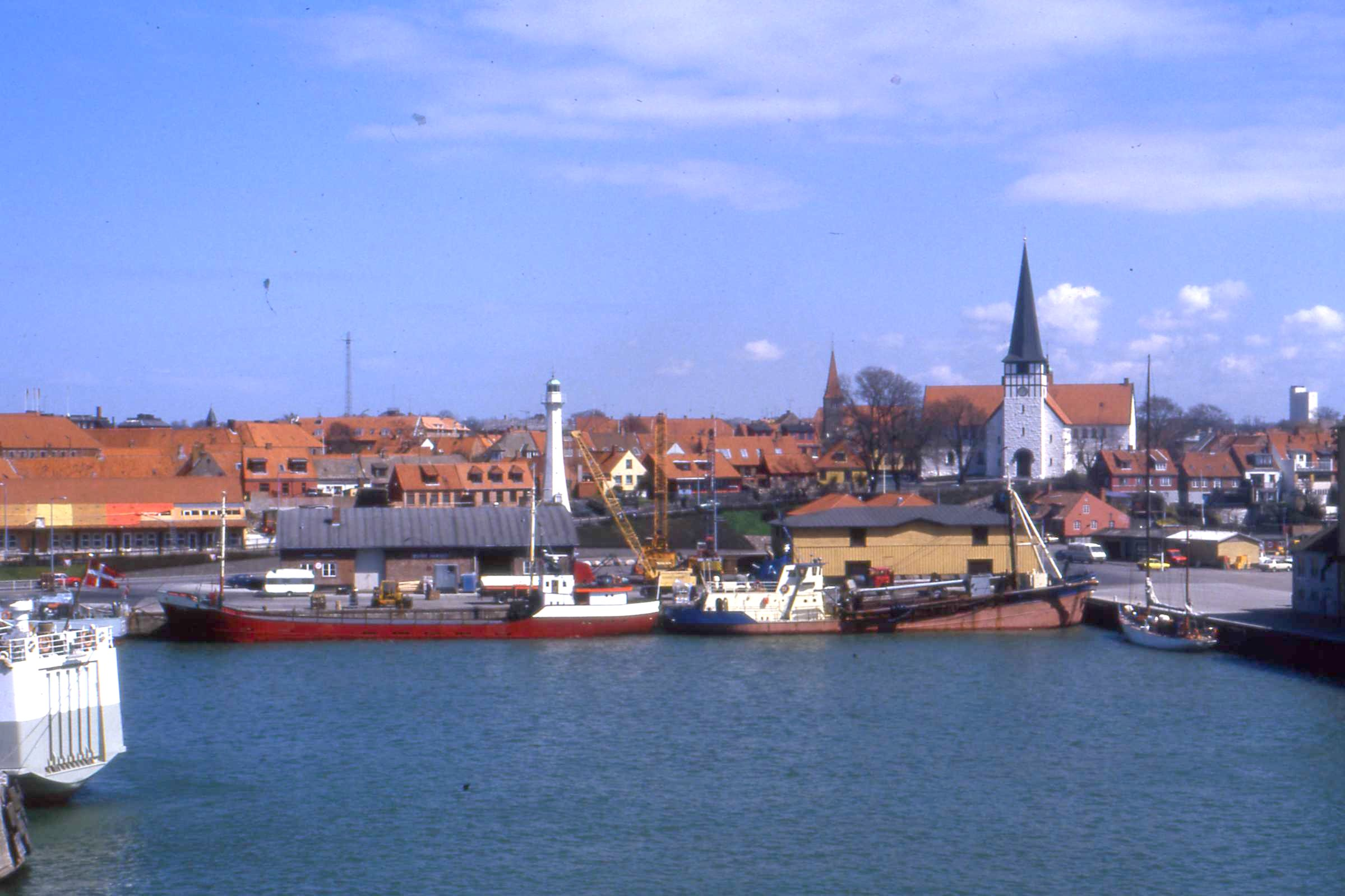 Rønne Harbour on Bornholm in Denmark